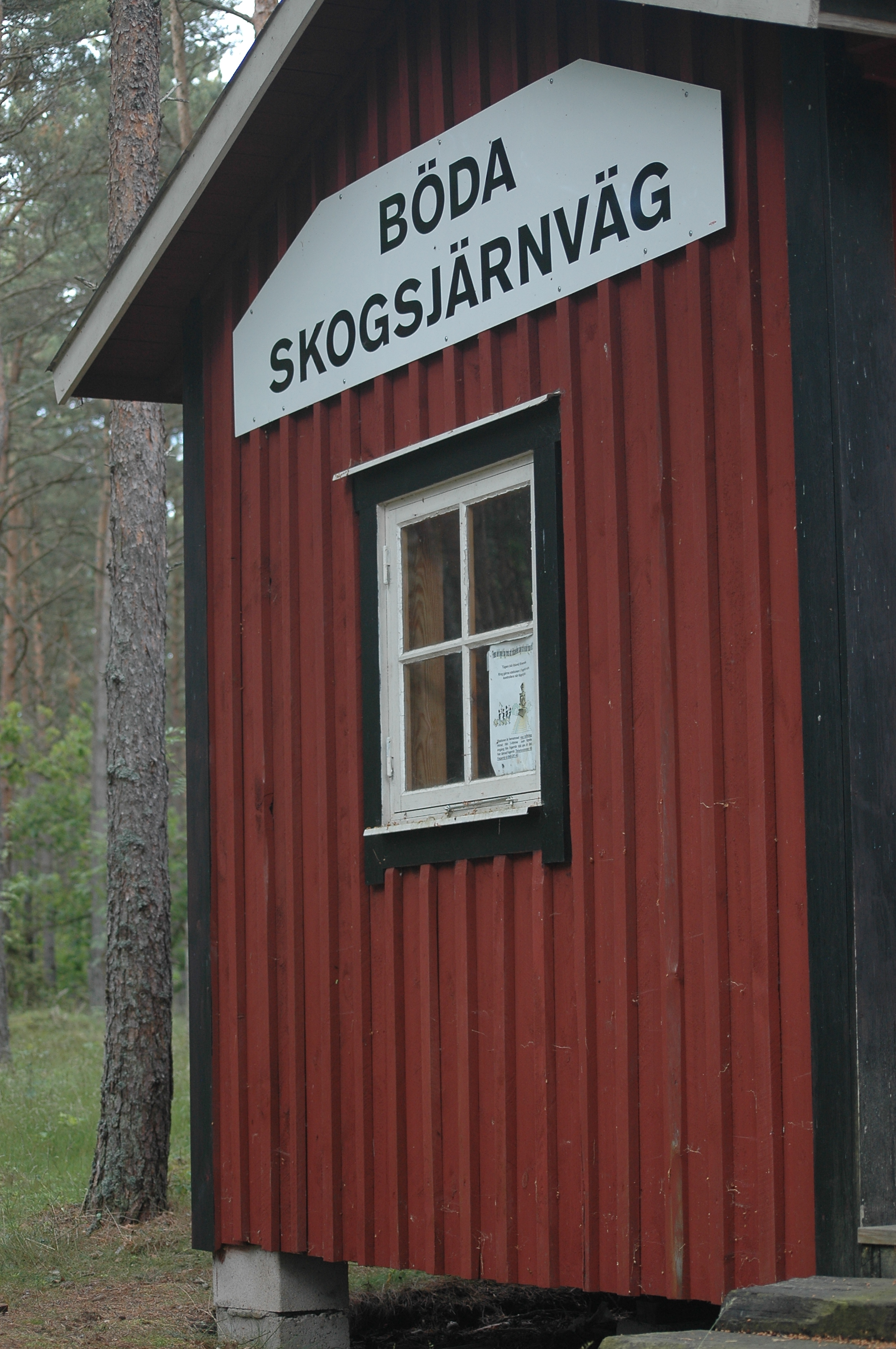 Stationshus vid Böda Skogsjärnväg, vid station nära Trollskogen.